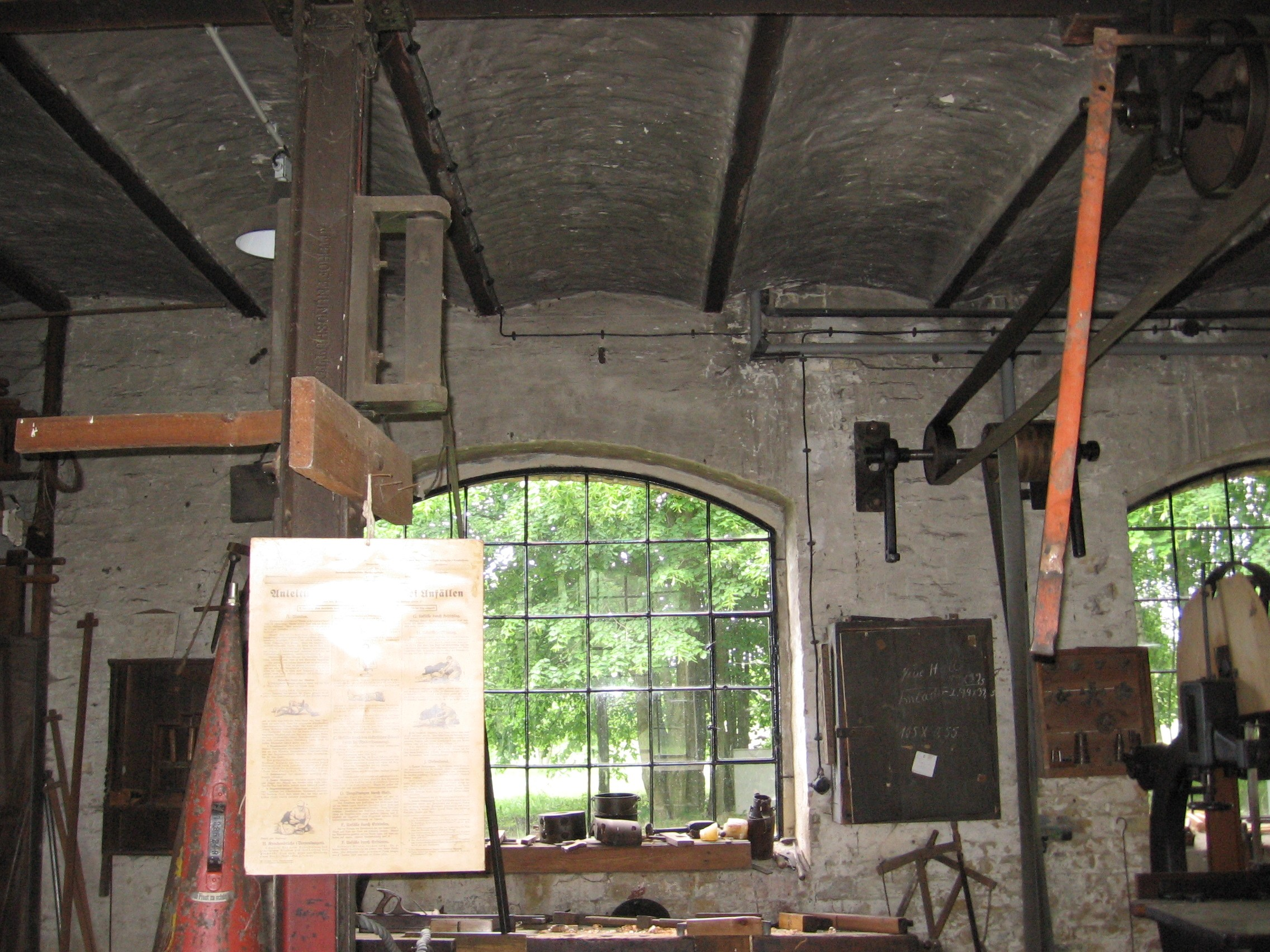 Preußische Kappendecke in einer Werkstatt von 1890